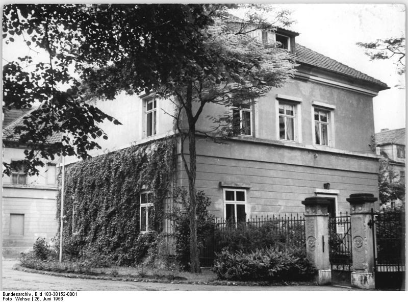 Weimar, Liszt-Haus Zentralbild Wehse (Erfurt) 26.6.1956 Das Liszt-Haus in Weimar Vor einigen Jahren war die Ursprünglichkeit der Räume des Weimarer Liszt-Hauses verändert worden. Ausser dem Salon wurden damals die Räume museal neu geordnet. Stimmen aus dem In-und Ausland hiessen dies nicht gut. So wurden jetzt die Räume des Liszt-Hauses wieder in ihren ursprünglichen Zustand versetzt und somit wieder die ursprüngliche Atmosphäre des Hauses geschaffen. Im Mai 1956 konnte das Liszt-Haus wieder seiner Bestimmung als Museum übergeben werden. Die Umgestaltung des Hauses stellt einen Beitrag zum 70. Todestag Franz Liszt´s am 31. Juli 1956 dar. 17 Jahre seines Lebens verbrachte dieser geniale Musiker in diesem Haus in Weimar. (Von 1869 bis kurz vor seinem Tode 1886.- Er starb in Bayreuth 1886, als er während des Festspiele dort weilte). UBz: Aussenansicht des Liszt-Hauses in Weimar.